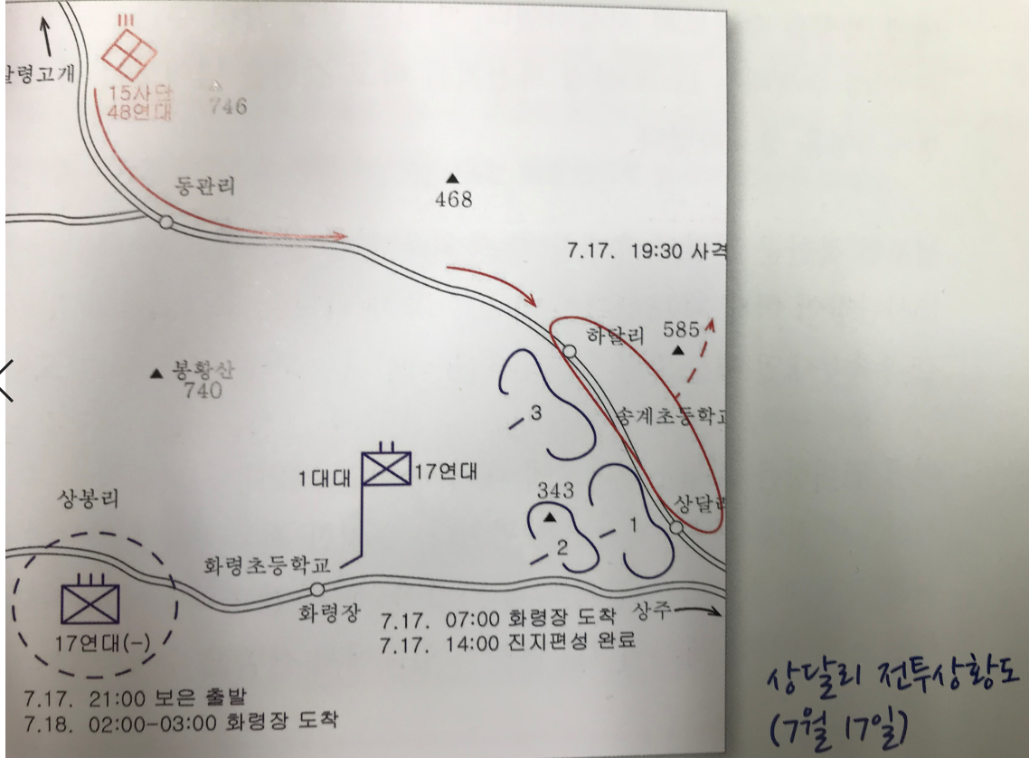 상달리 전투상황도이다.